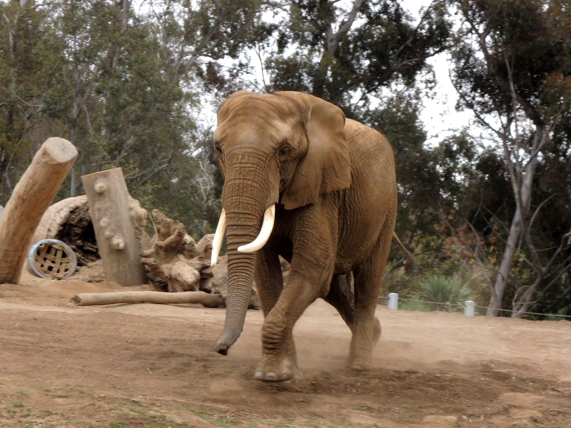 Éléphant de savane d'Afrique (Loxodonta africana) au zoo de San Diego.